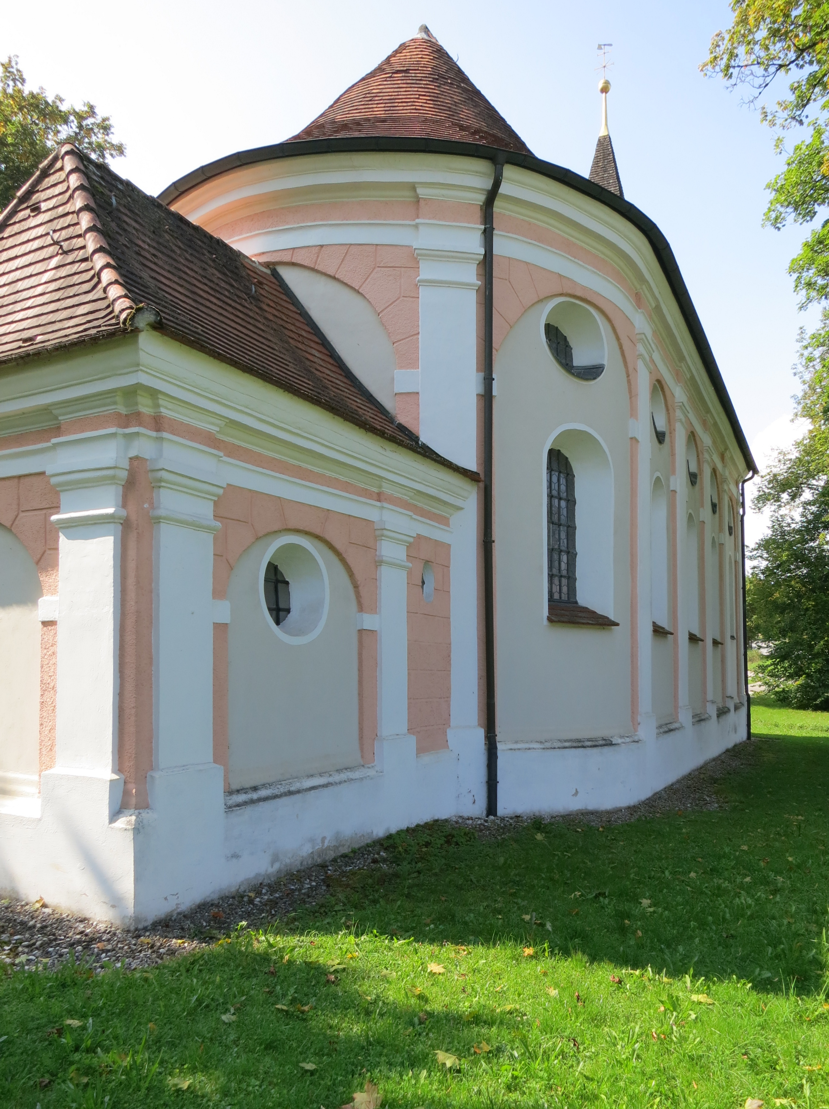 Die katholische Kirche St. Wolfgang bei Pipinsried. Langhaus (und Sakristei?) aus Ost.